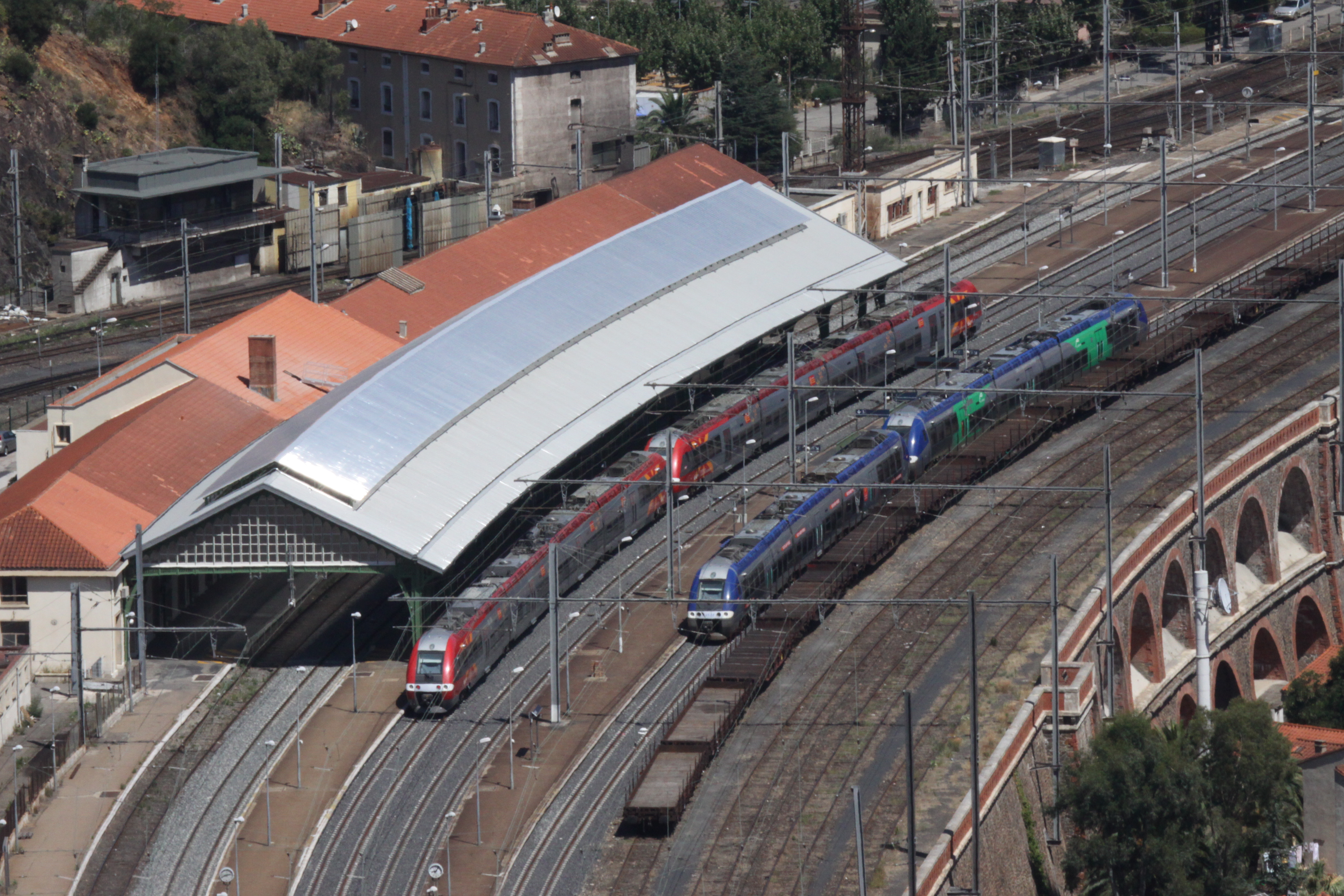 Vue rapprochée sur le bâtiment de la gare ferroviaire de Cerbère. Cette gare est située du côté français. Photographie prise depuis l' ancien poste-frontière. Cerbère, Pyrénées-Orientales, France.